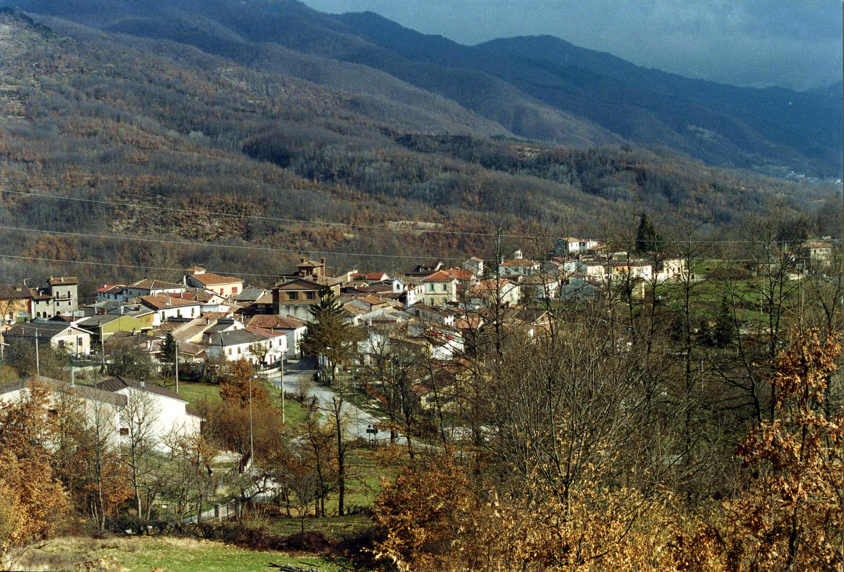 Autore: Stefano Di Giammarco Fonte: foto reflex scansionata e concordata con l'autore per la messa in rete Descrizione: Aringo come appare da nord, dalla strada interpoderale delle Sore